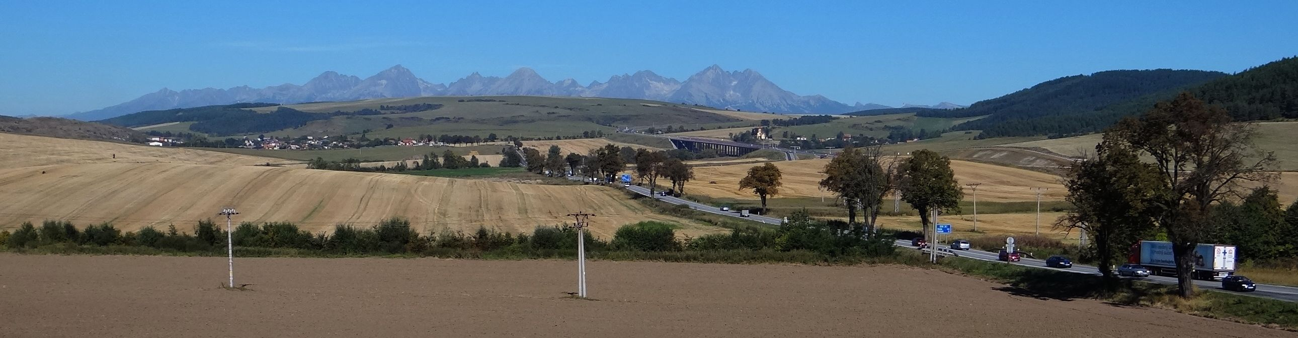 Hornádska kotlina